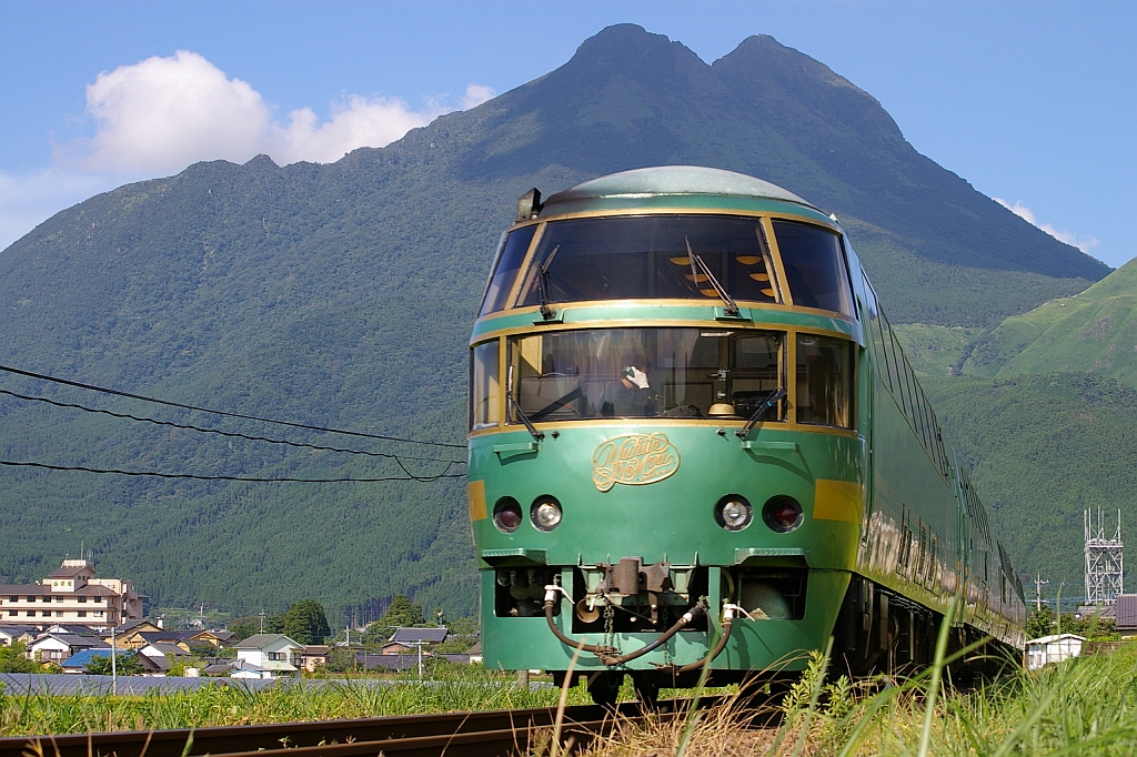 JR九州久大本線、由布院駅～南由布駅間で撮影。由布院駅付近の大分川を渡る鉄橋付近です。